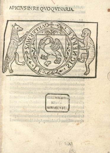 Apicius, editio princeps 1498, title page